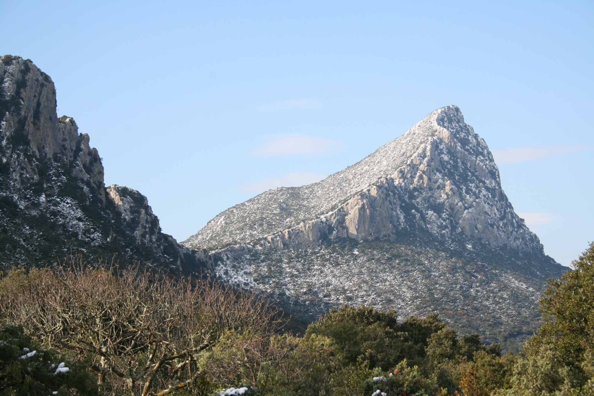 Pic Saint Loup - Hérault - France; le 10 janvier 2010, sous la neige